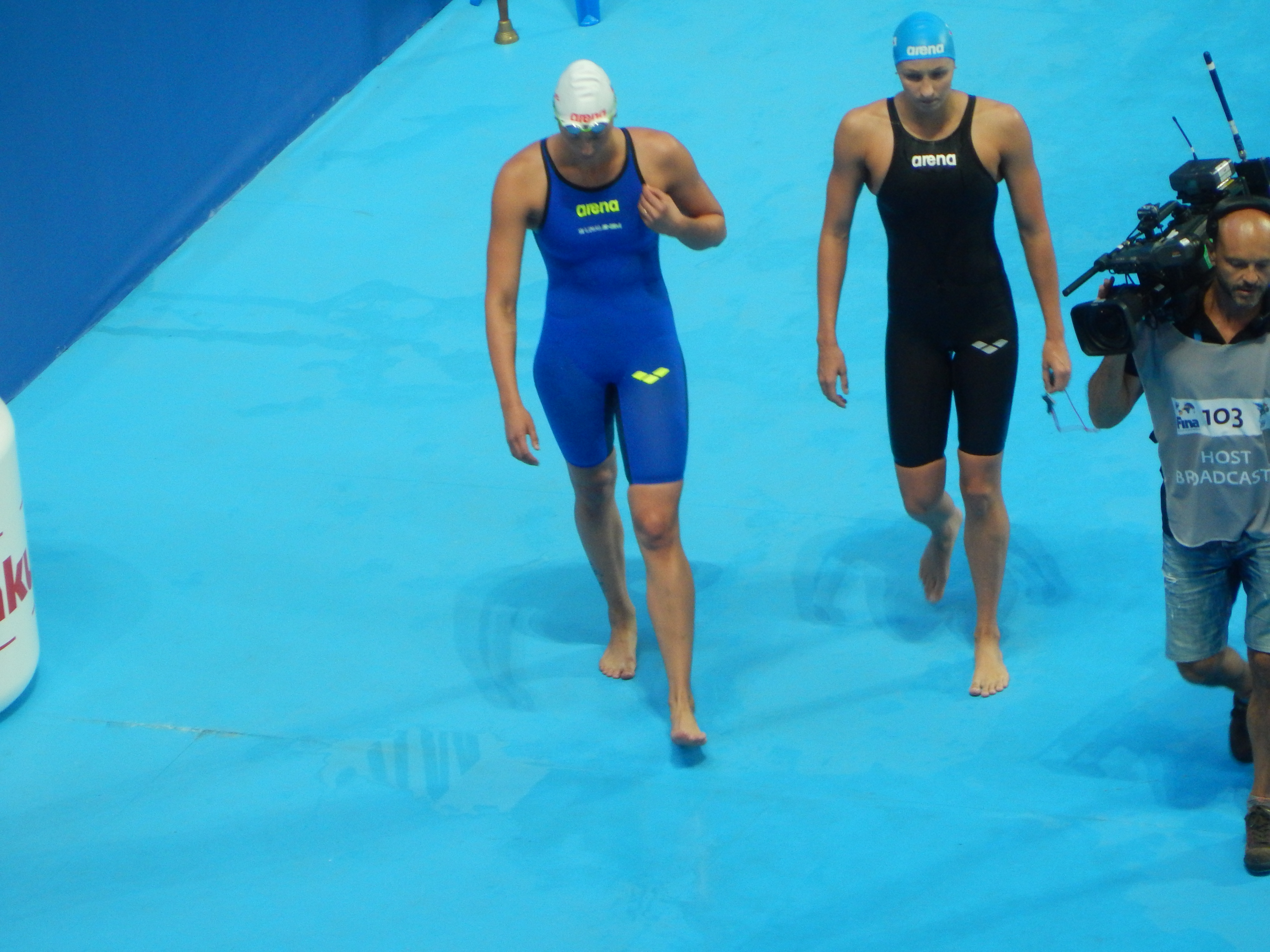 Вероника Попова и Виктория Андреева на чемпионате мира в Казани (полуфинал 200 метров в/с)